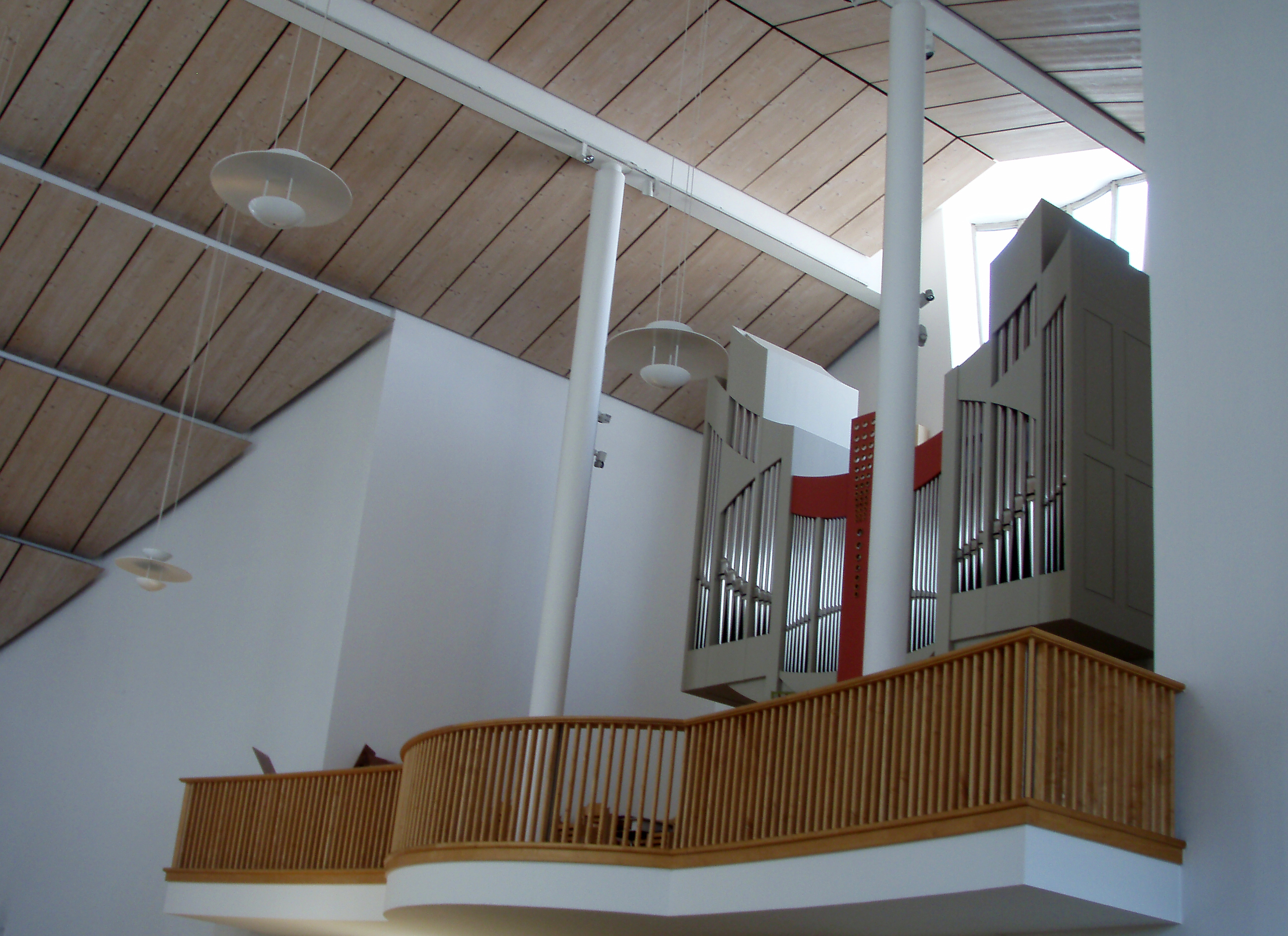 Kath. Pfarrkirche hl. Maria in Maishofen, Land Salzburg, Österreich